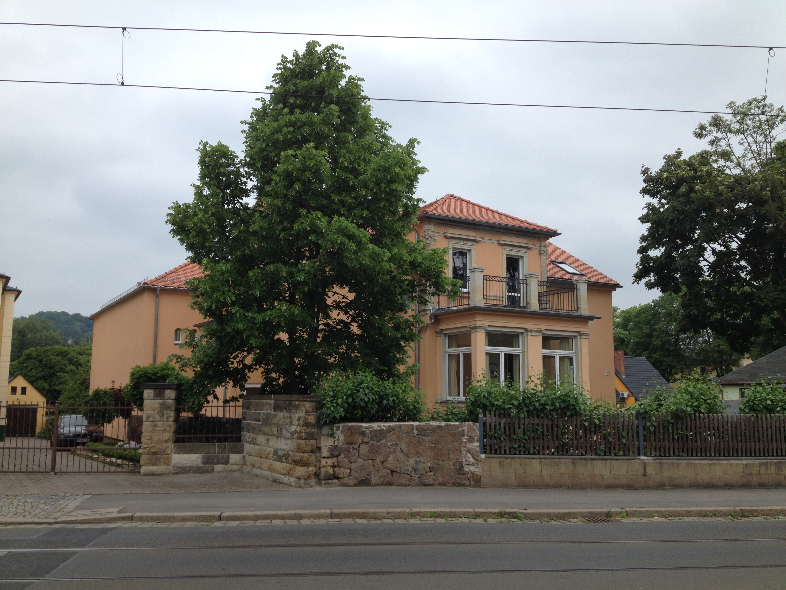 Radebeul Villa Tini